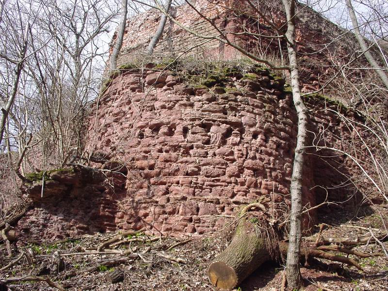 Grillenburg - südöstlicher Zwingerturm und Schildmauer